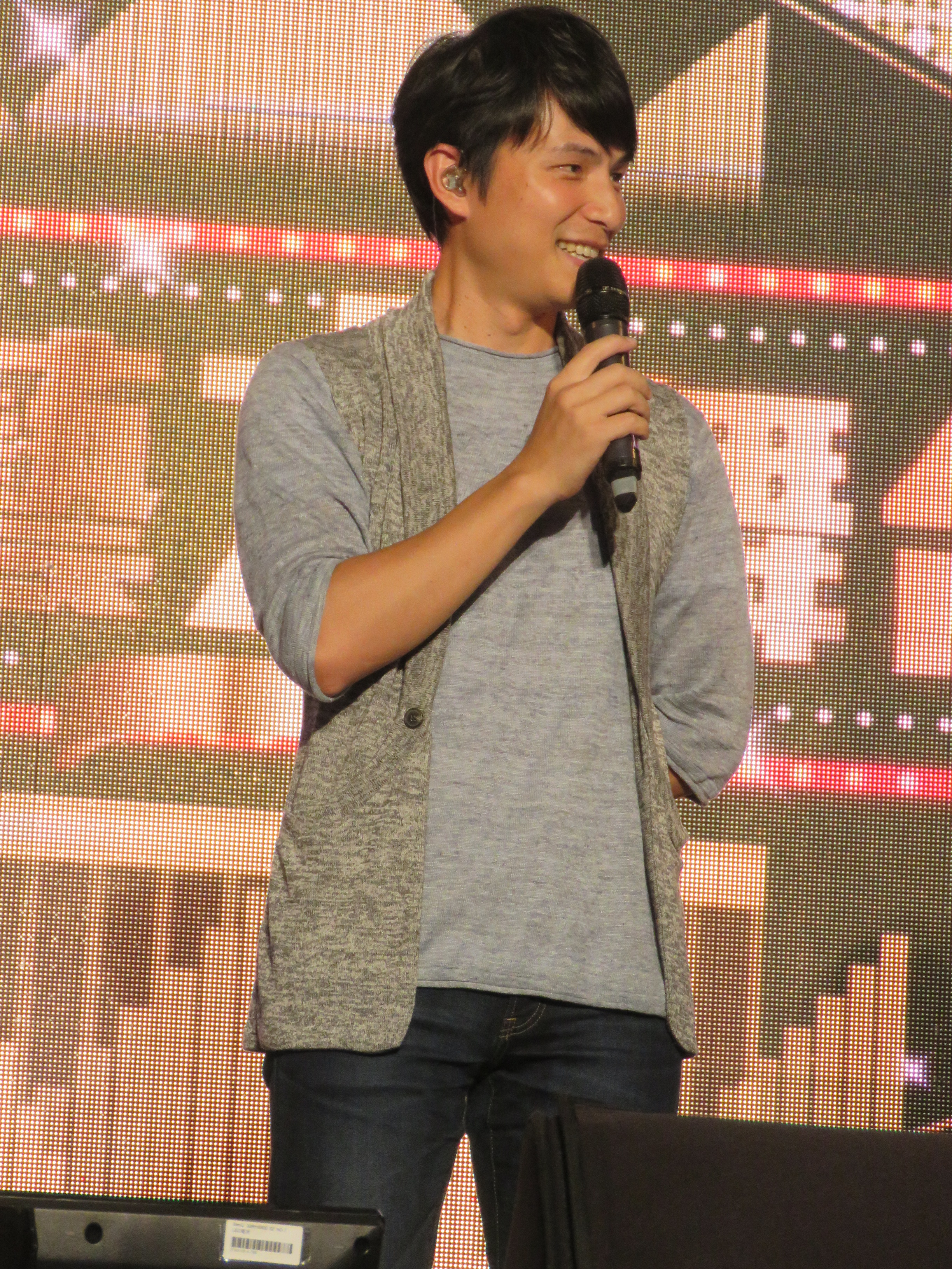 中文（台灣）: 2018.07.13 台中社口萬興宮 孫協志參加台中數位頻道《綜藝大舞台》錄影